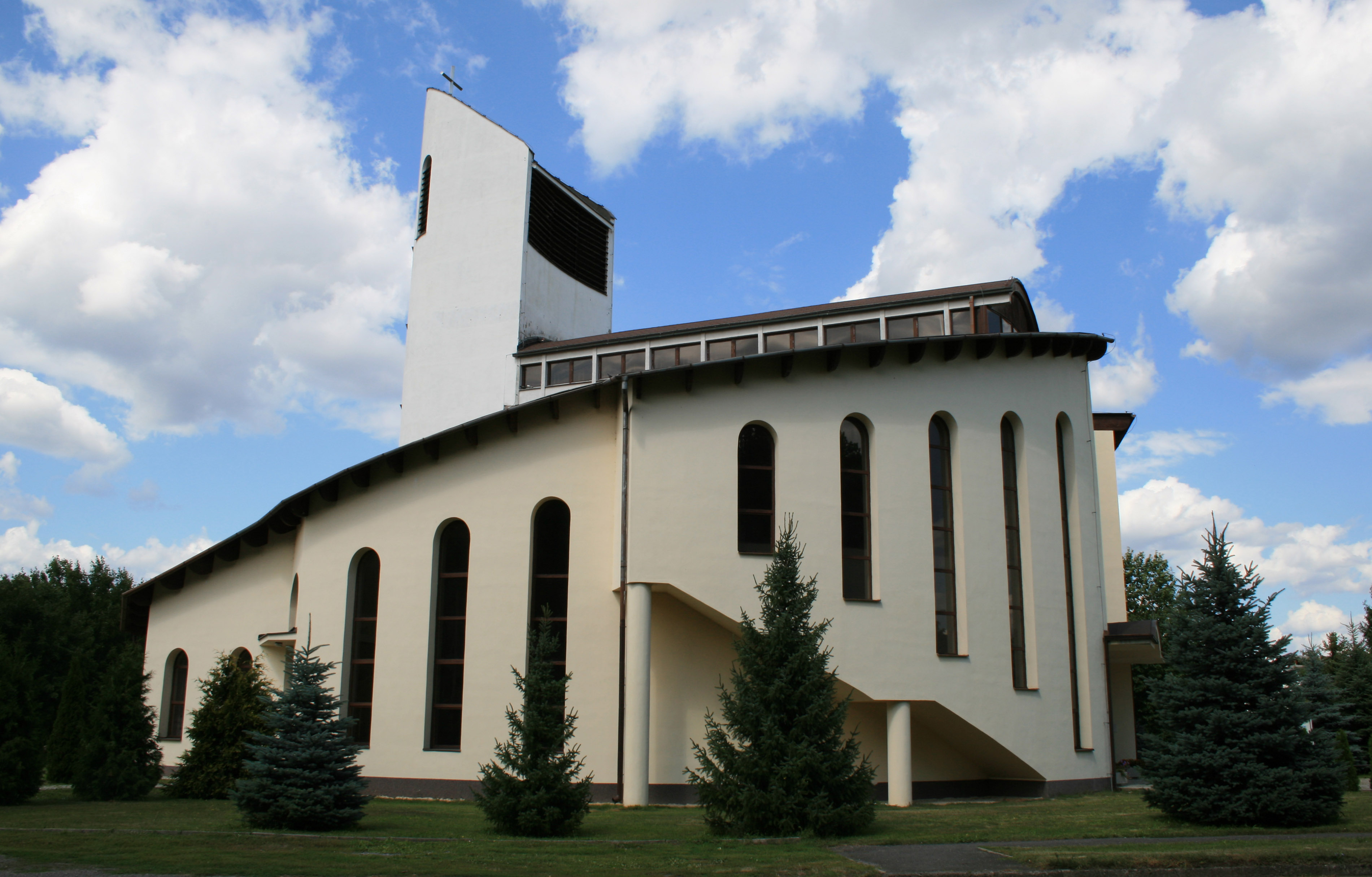 Evanjelický kostol v Dudinciach